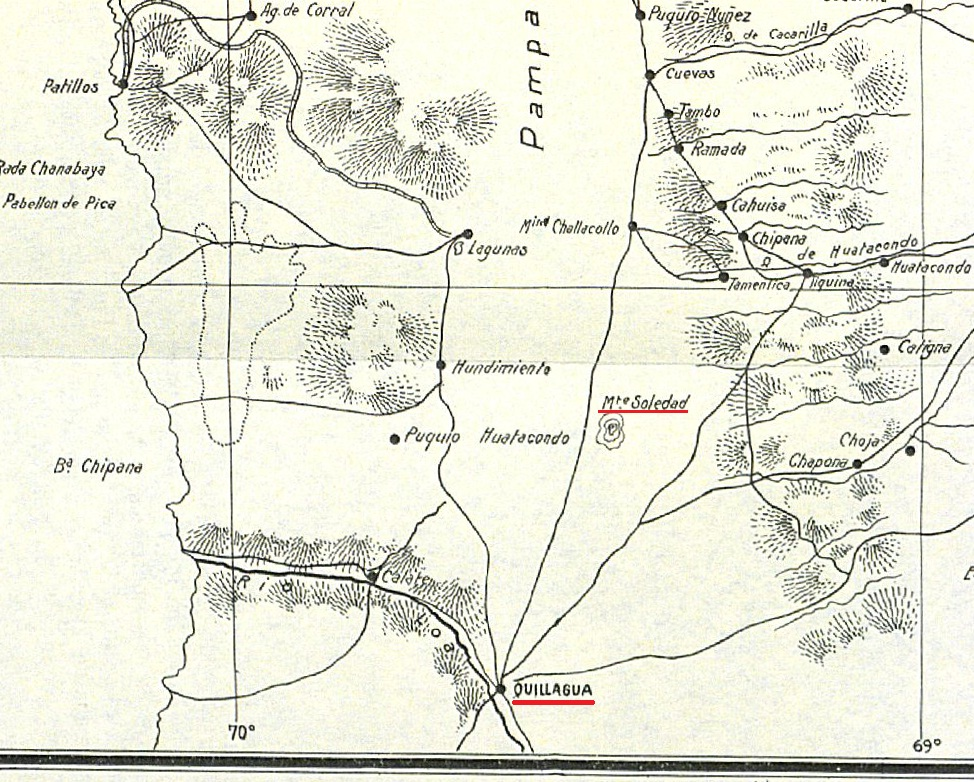 Detalle del mapa de la campaña de Tarapacá inserto en la obra de Wilhelm Ekdahl, "Historia de la Guerra del Pacífico", 1901.